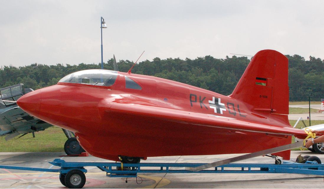 Messerschmitt Me 163 Glider Photo: Jean-Patrick Donzey